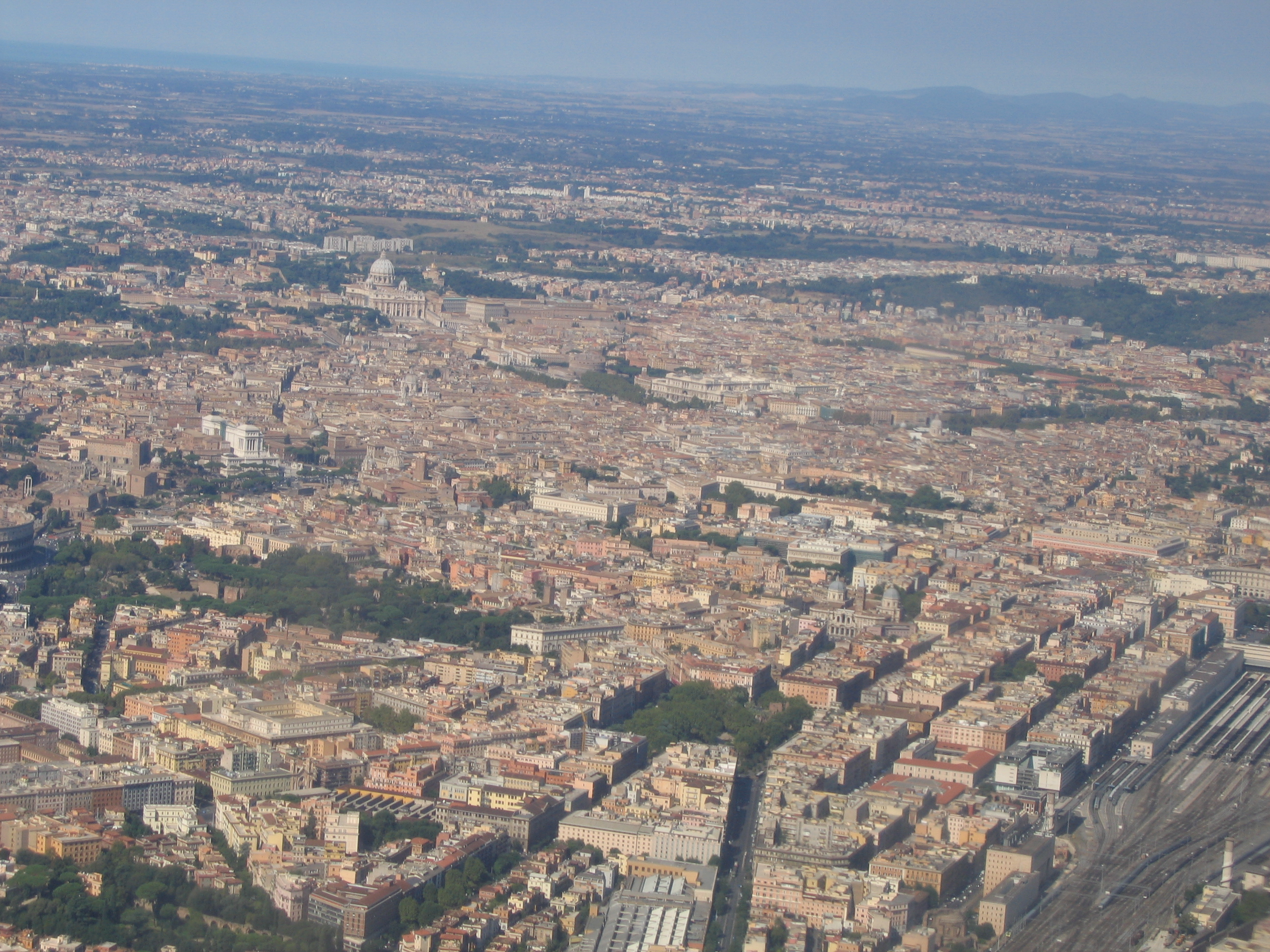 Vue aérienne de Rome vers l'ouest, depuis un avion atterrissant à Ciampino.